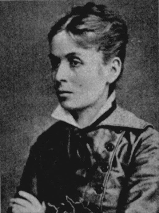 Фигнер Лидия Николаевна - Русская революционерка, народница, член революционной организации.